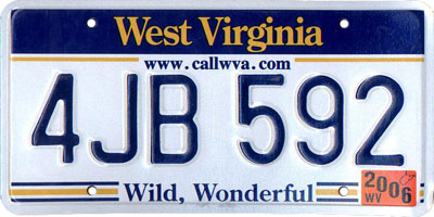 West Virginia License Plate 2006